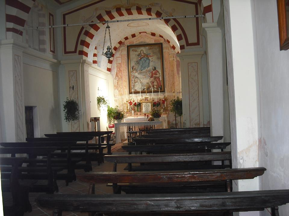 interno della chiesa di san Vigilio a Droane di Valvestino in provincia di Brescia